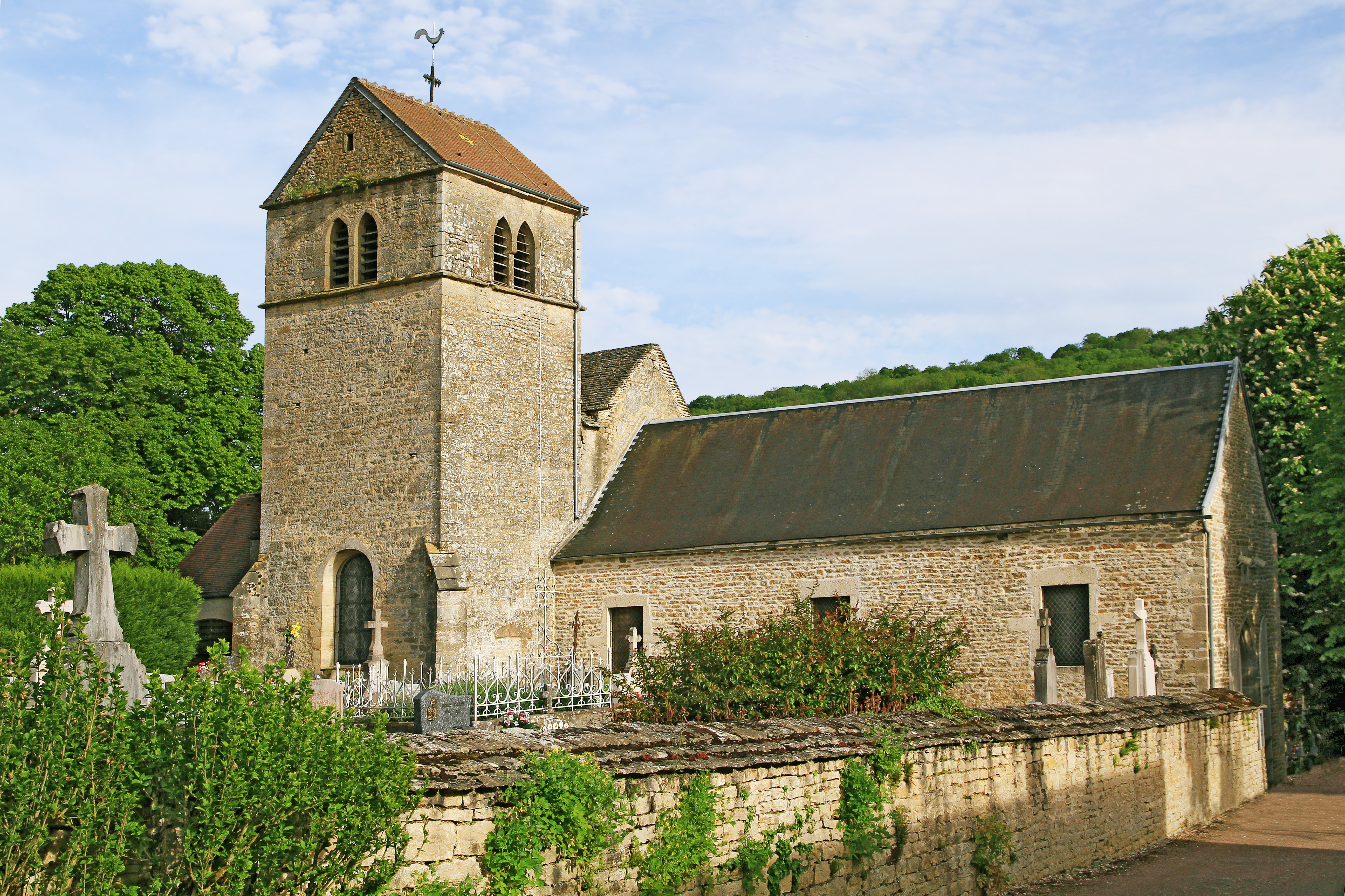 Église de la Nativité de Soussey-sur-Brionne